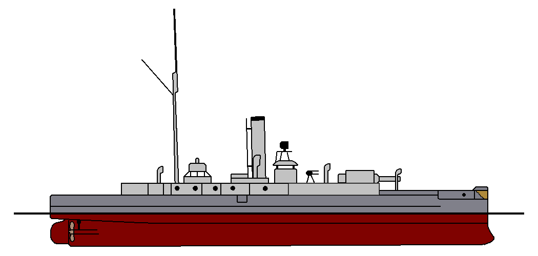 Seitenriss der SMS Wespe im Zustand von 1900 mit der ab 1896 gültigen Farbgebung von steuerbord.